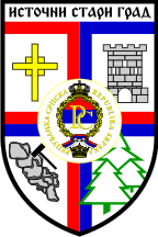 Grb općine Istočni Stari Grad